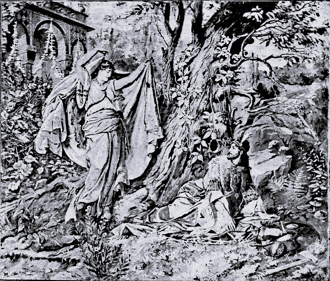 Feenmädchen